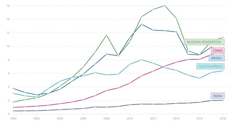 Source: World Bank Data Graph created with World Bank Online Data Visualization Tool